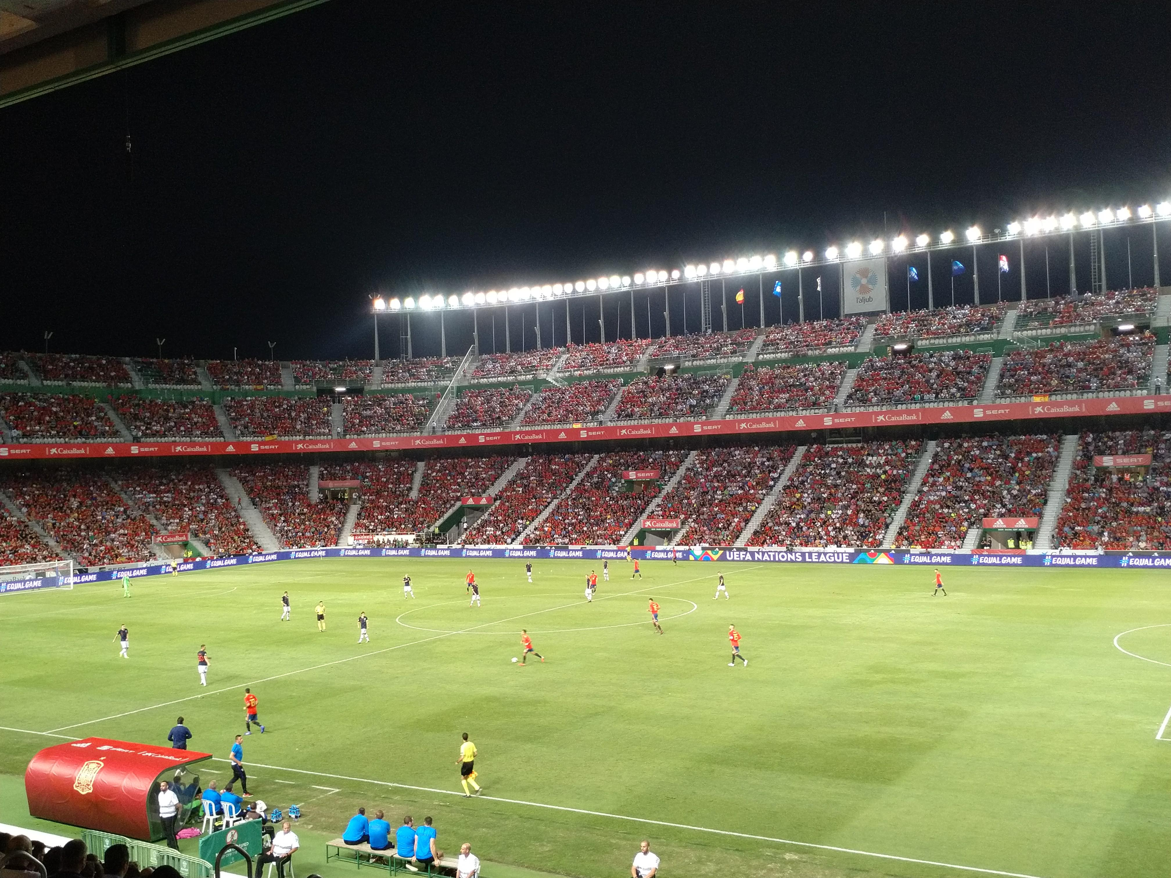 Imagen histórica de un partido histórico